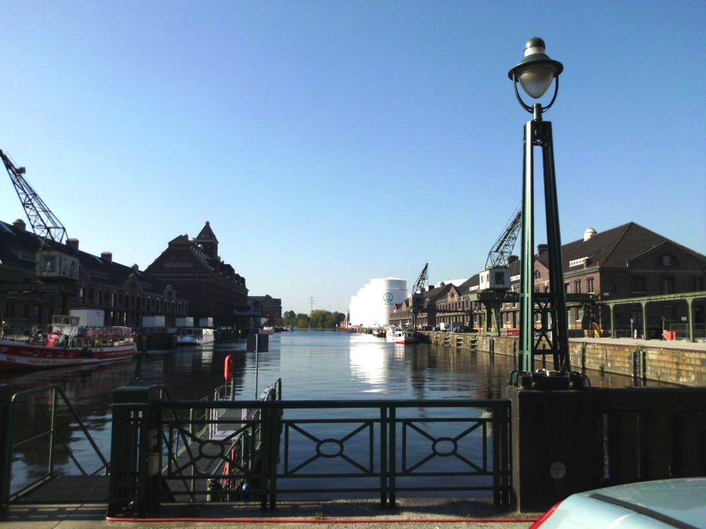 Hafenbecken im Berliner Westhafen